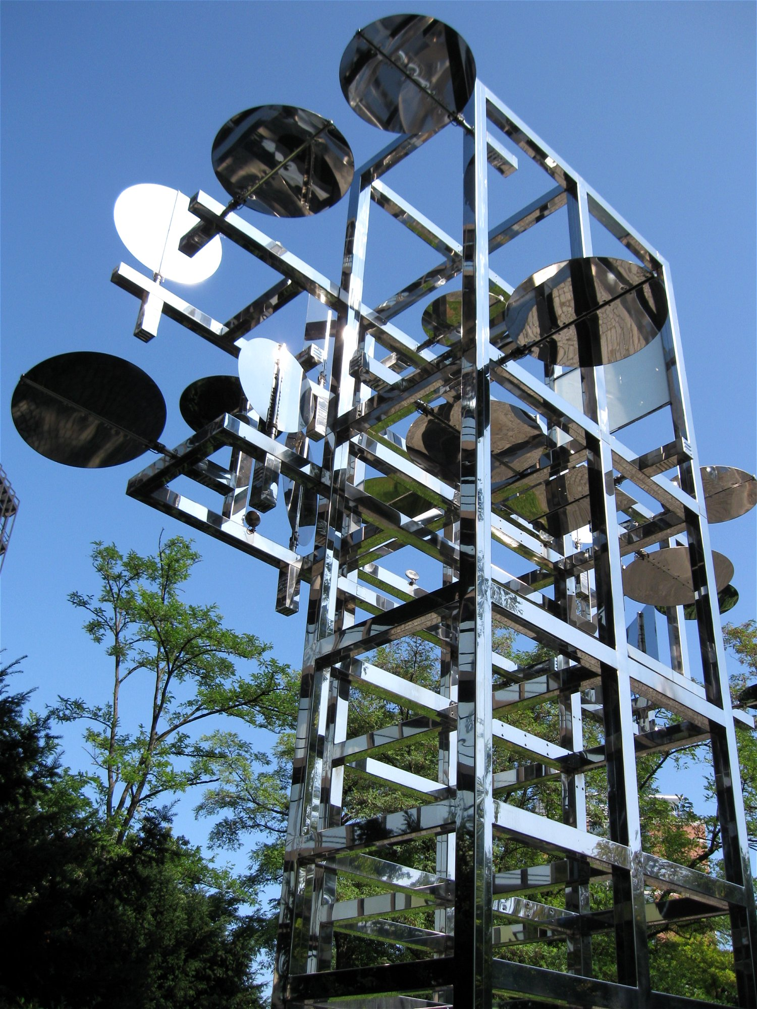 Nicolas Schöffer: Chronos 10B, 12,5 m hoch, Edelstahl, Elektromotoren, Scheinwerfer und Spiegel; 1980, Europäisches Patentamt, München